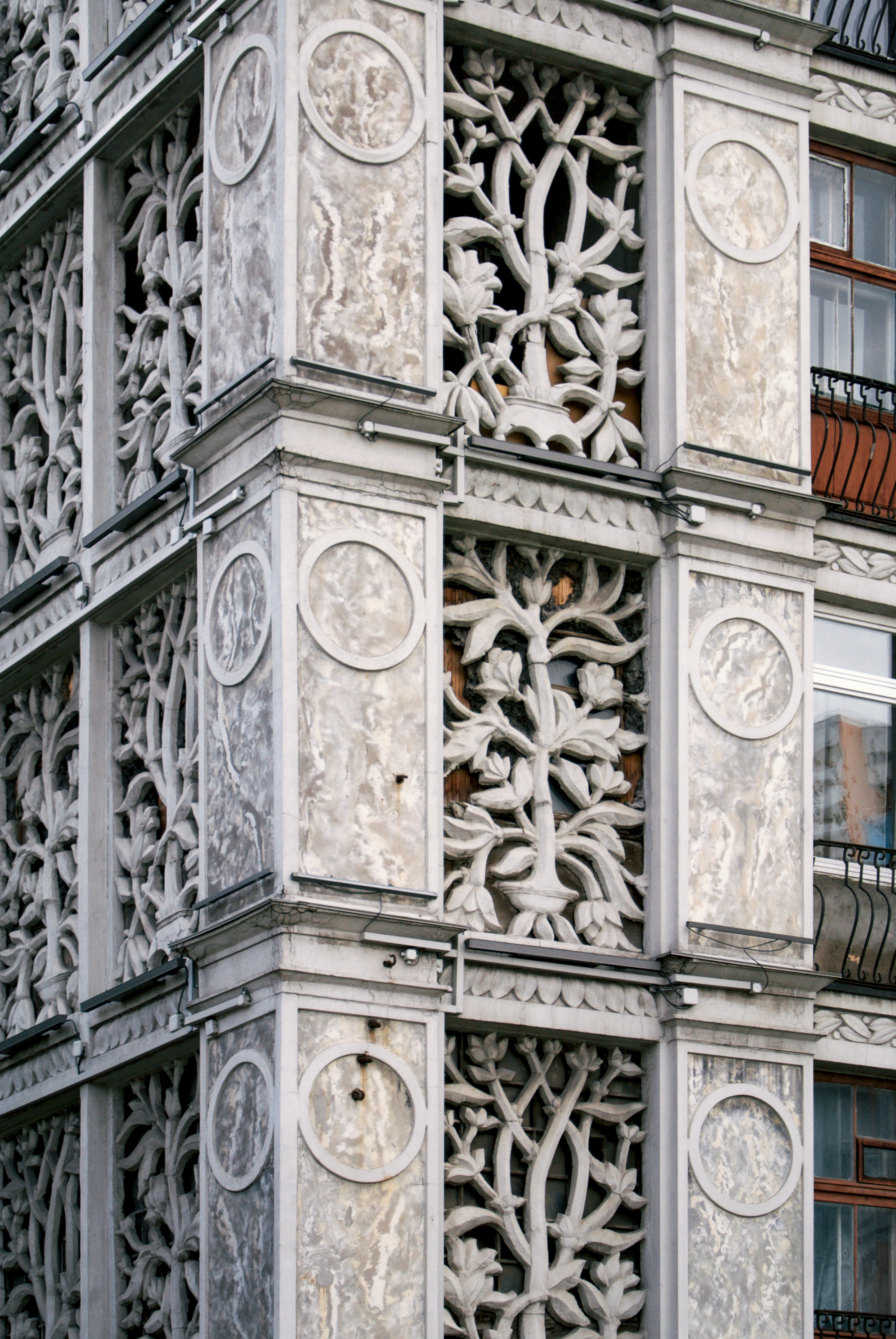 Жилой дом: Ленинградский просп., дом 27, Беговой, Северный округ, Москва